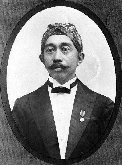 Repronegatief. Regent van Magetan, stichter en voorzitter van de landbouwvereniging Mardi Poerno.